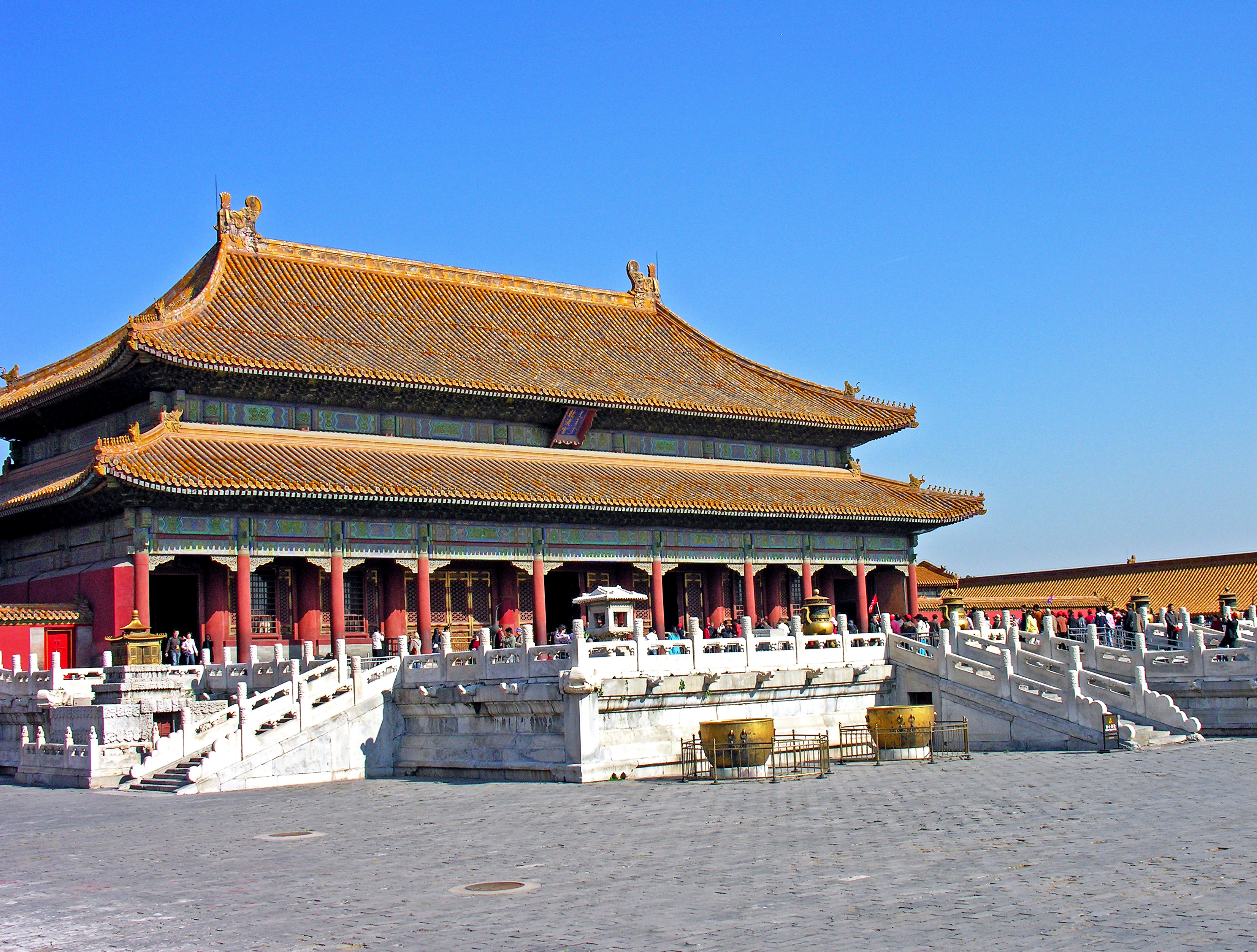 China-6233